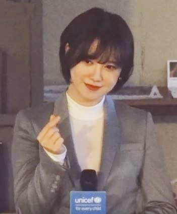 배우 구혜선이 9일 오후 마포구 합정동 문화예술공간 디벙크에서 열린 유니세프 토크콘서트 '구혜선이 들려주는 차드의 심장소리'에 참석했다.